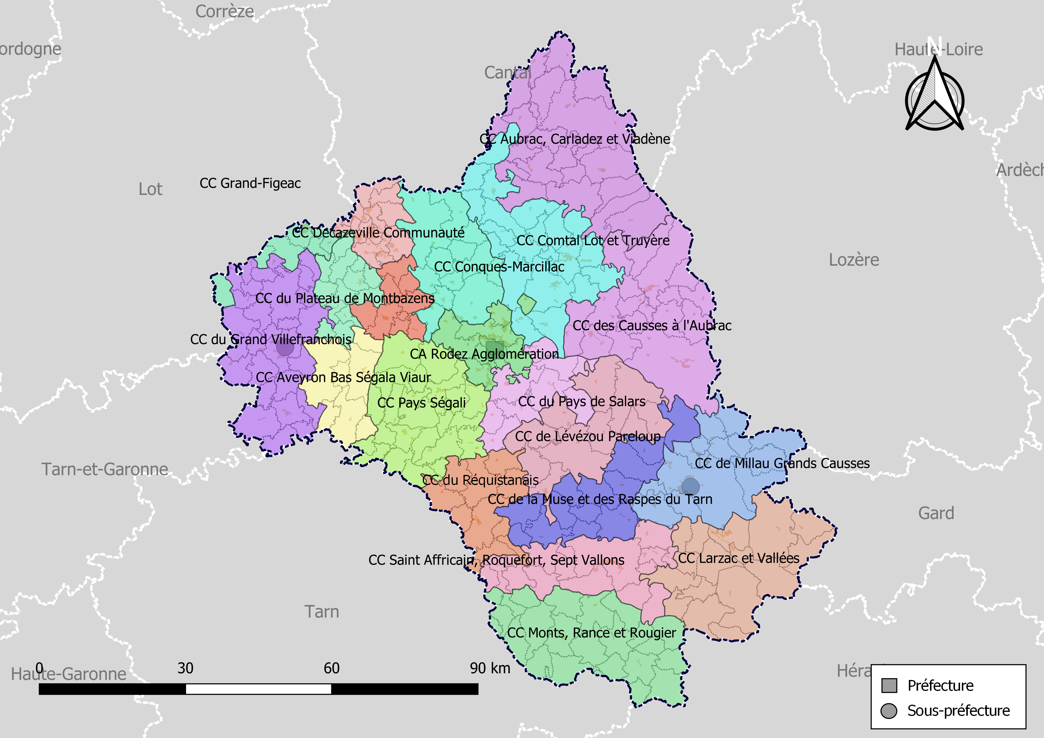 Carte des intercommunalités du département de l'Aveyron, France. Composition au 1er janvier 2019